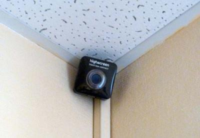 Видеорегистратор с модулем Wi-Fi Highscreen Black Box Connect в качестве камеры охранного видеонаблюдения